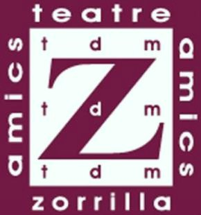 Amics Teatre Zorrilla